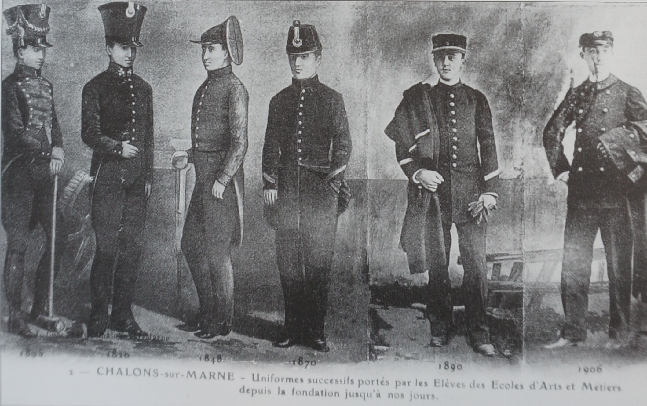 vue de : Cf titre.